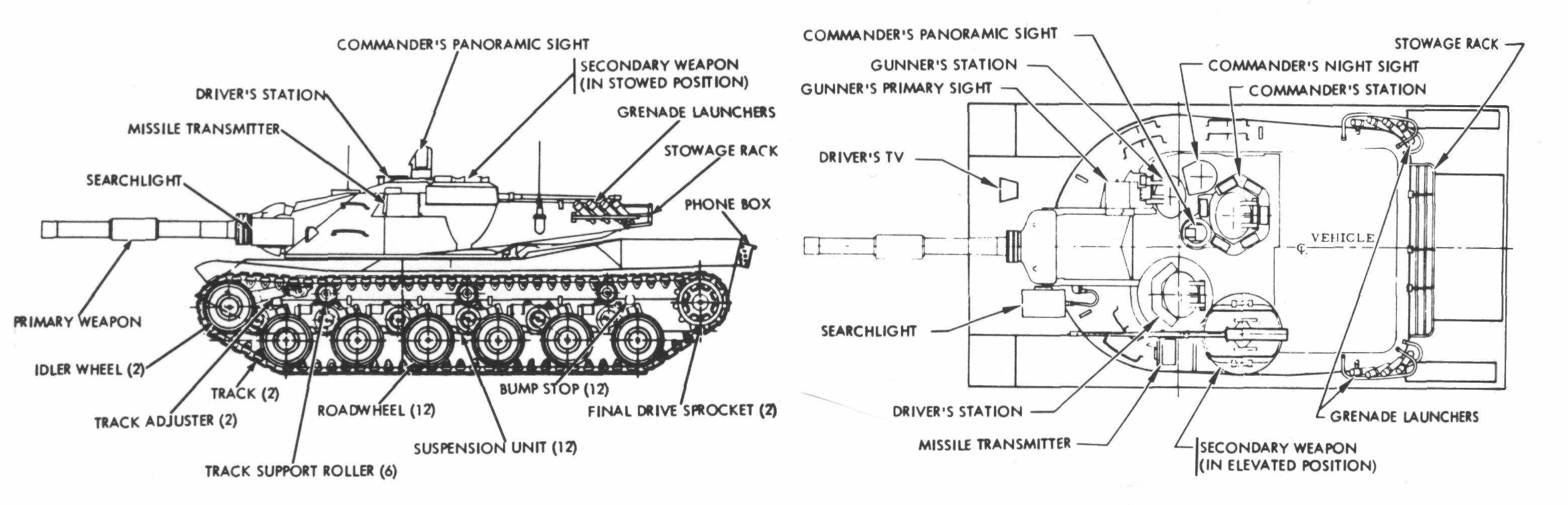 MBT-70 schema.